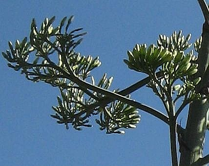 Agave americana, ex hortus.